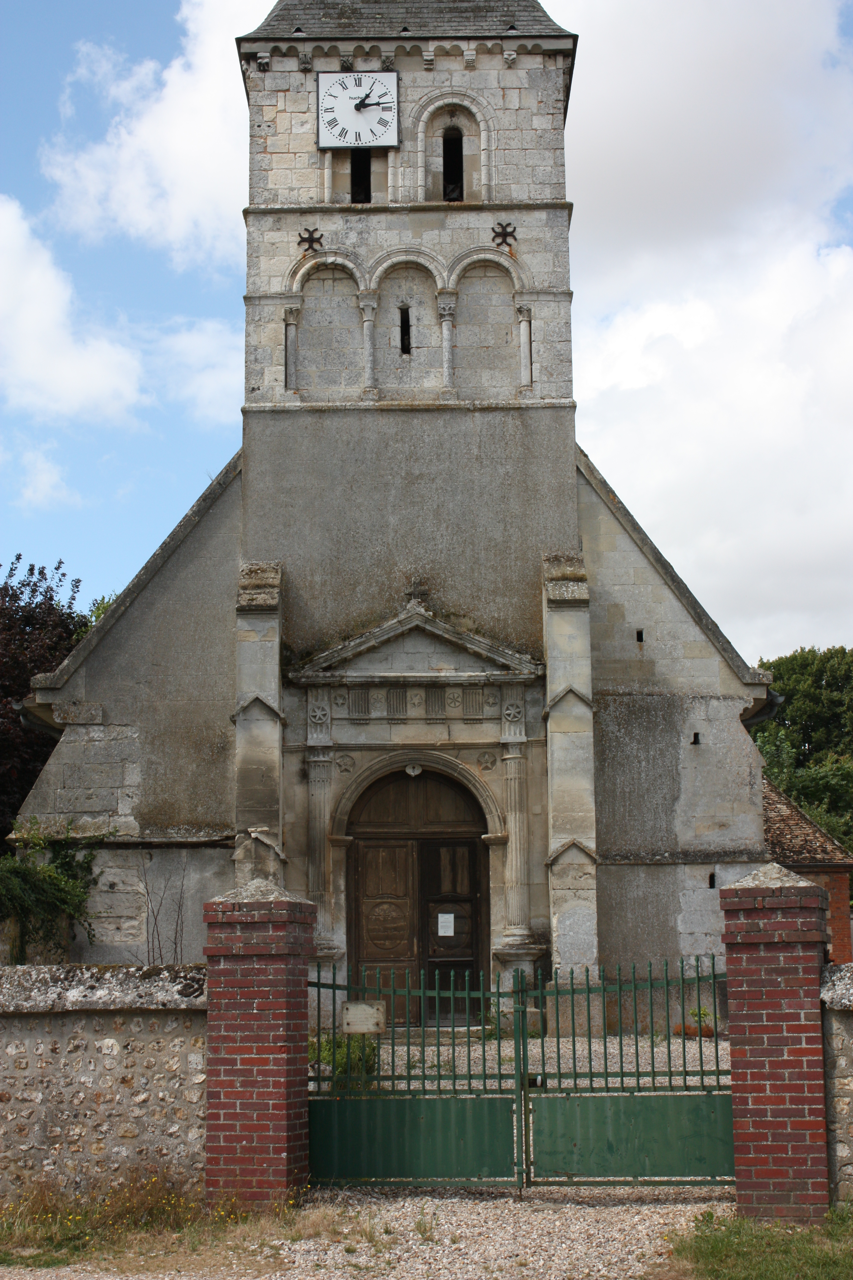 Daubeuf-la-Campagne - Eglise Notre-Dame